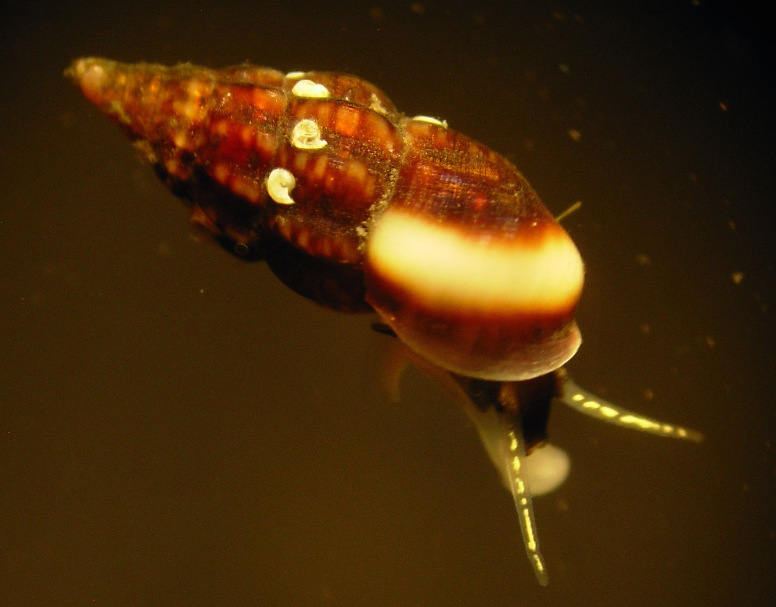 Rissoa guerini. Vue latéro-dorsale de la coquille et de la tête.